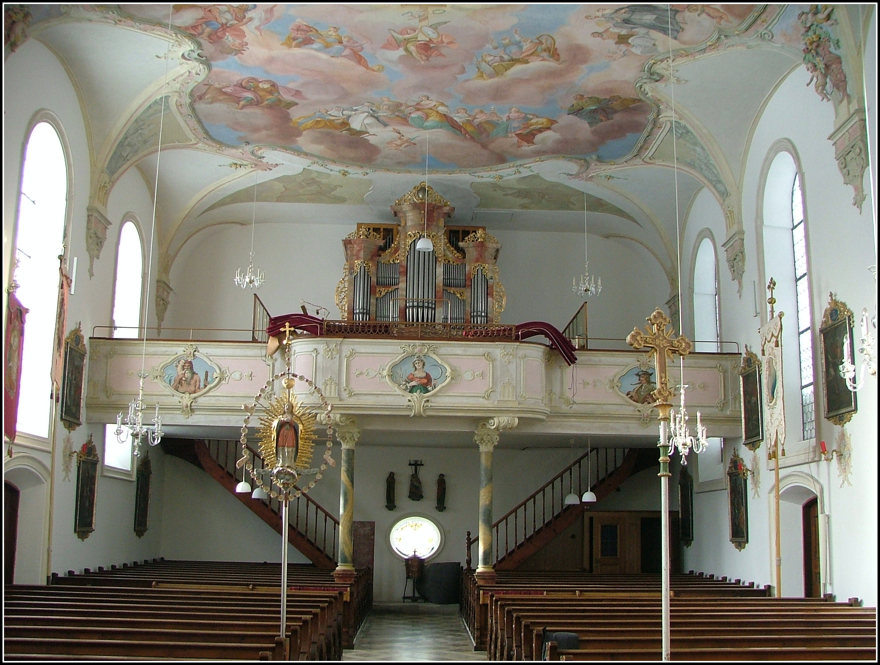 Empore